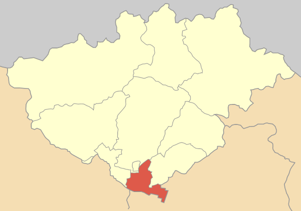 Locator map of Kalambaki municipality (Δήμος Καλαμπακίου) in Drama prefecture (Νομός Δράμας) in Greece.